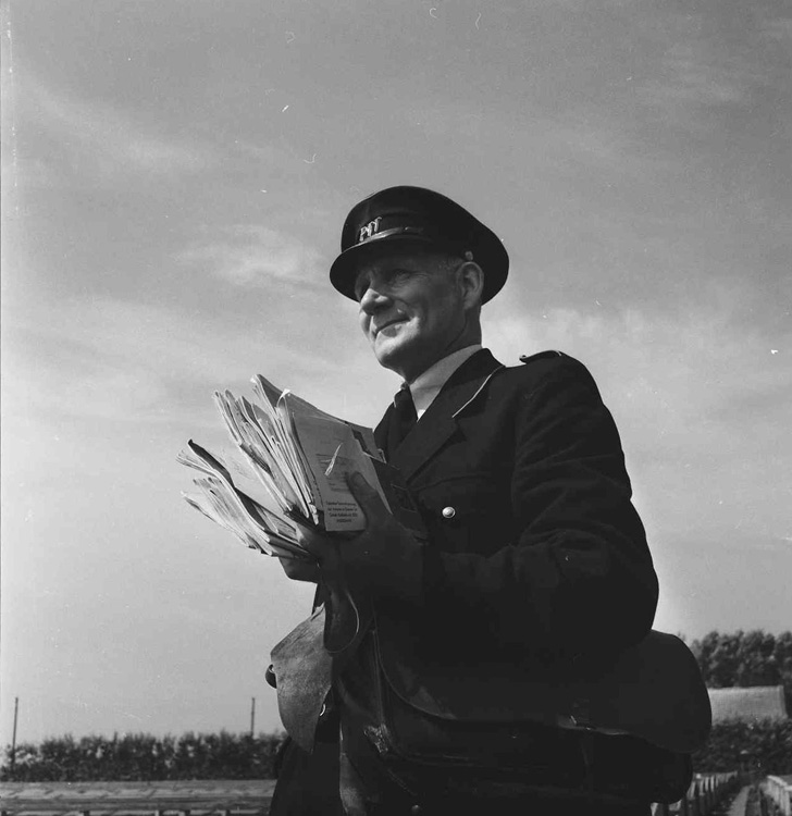 Postbezorging in de Slotermeerpolder door twee PTT-brievenbestellers per roeiboot, 4 augustus 1954 Foto: Ben van Meerendonk / AHF, collectie IISG, Amsterdam